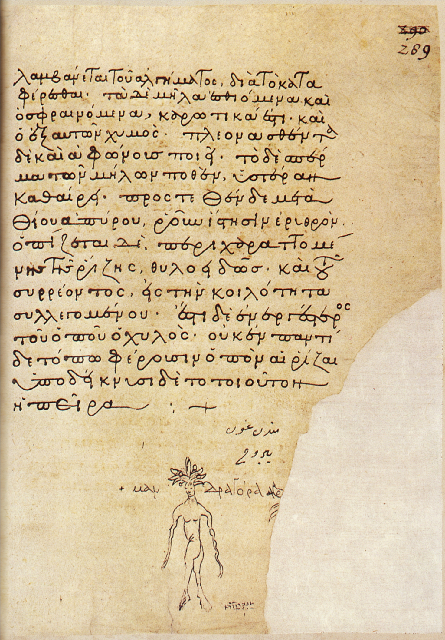 Eines der beigebundenen Papierblätter im Wiener Dioskurides mit der Federzeichnung eines Alraunmännchens (fol. 289 recto). Die insgesamt drei Blätter (287r – 289v) enthalten eine Abschrift des verloren gegangenen Textes über die Mandragora (archaisierende Minuskel des 13. Jahrhunderts). Blatt 289v ist leer.